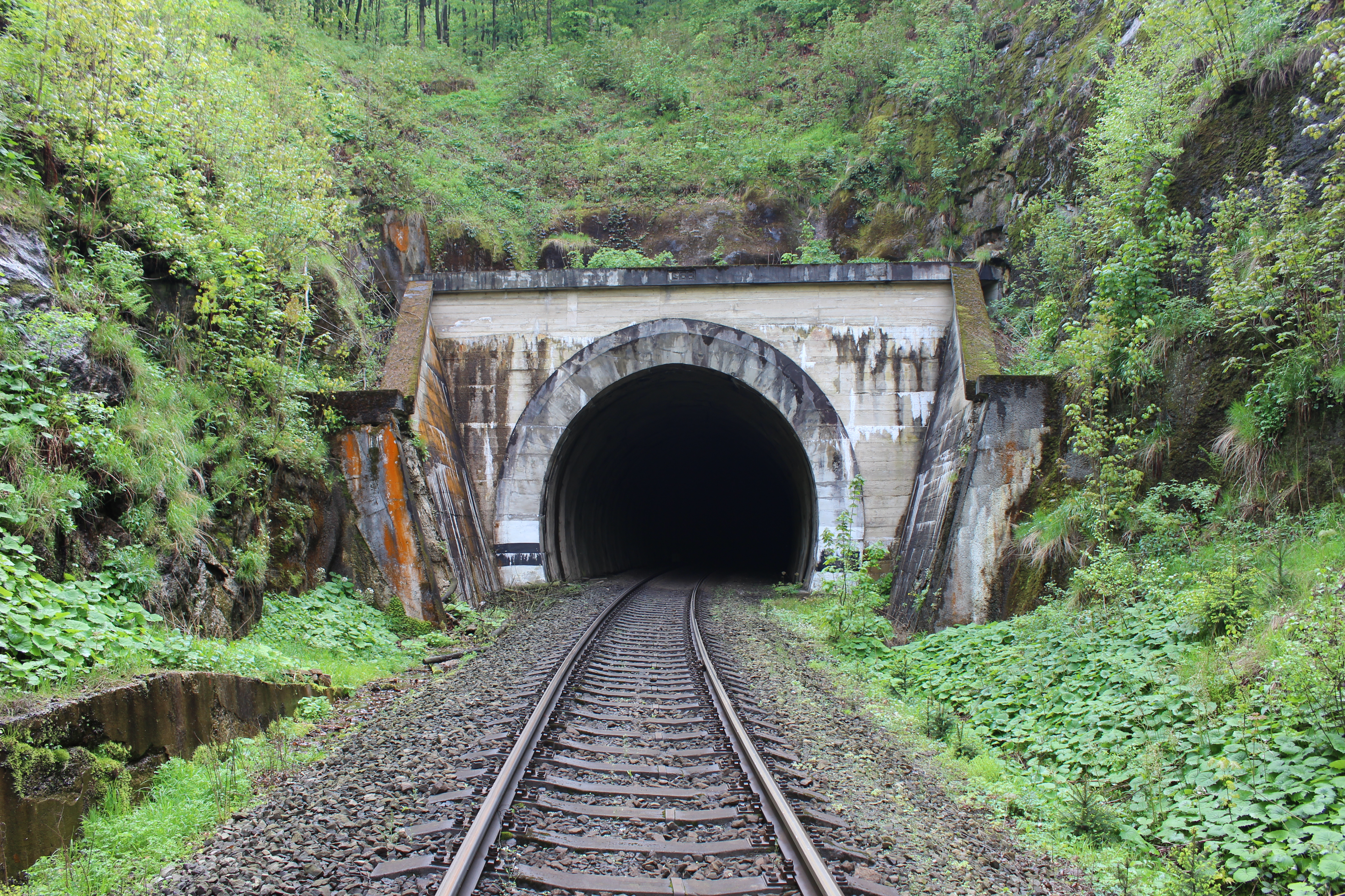 Raspenavský portál Mníšeckého tunela na trati 037 Liberec-Zawidów. This photograph was taken with a Canon EOS 600D.